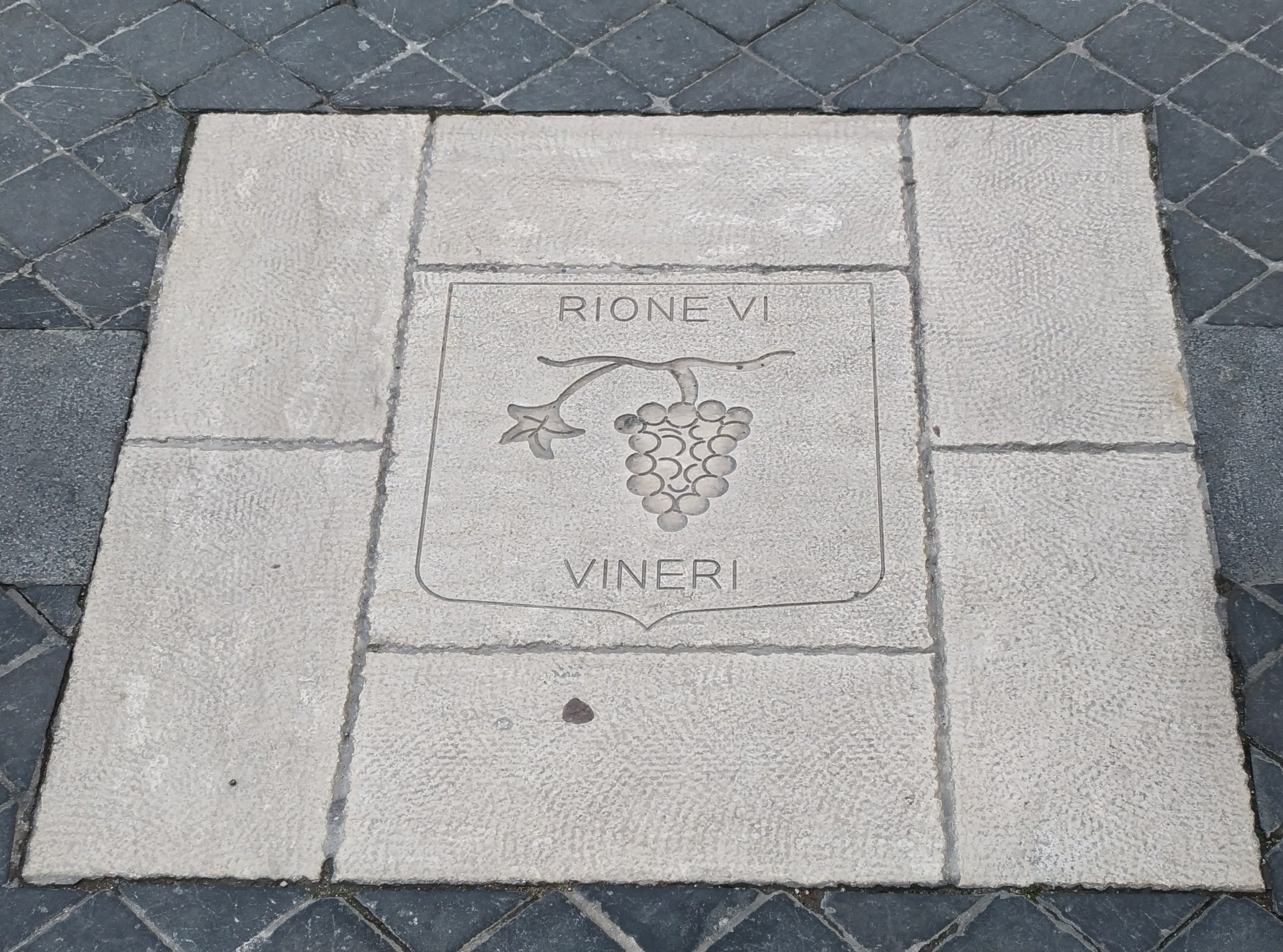 Stemma del rione Vineri riprodotto nella pavimentazione di piazza Santa Maria Maggiore (Alatri)